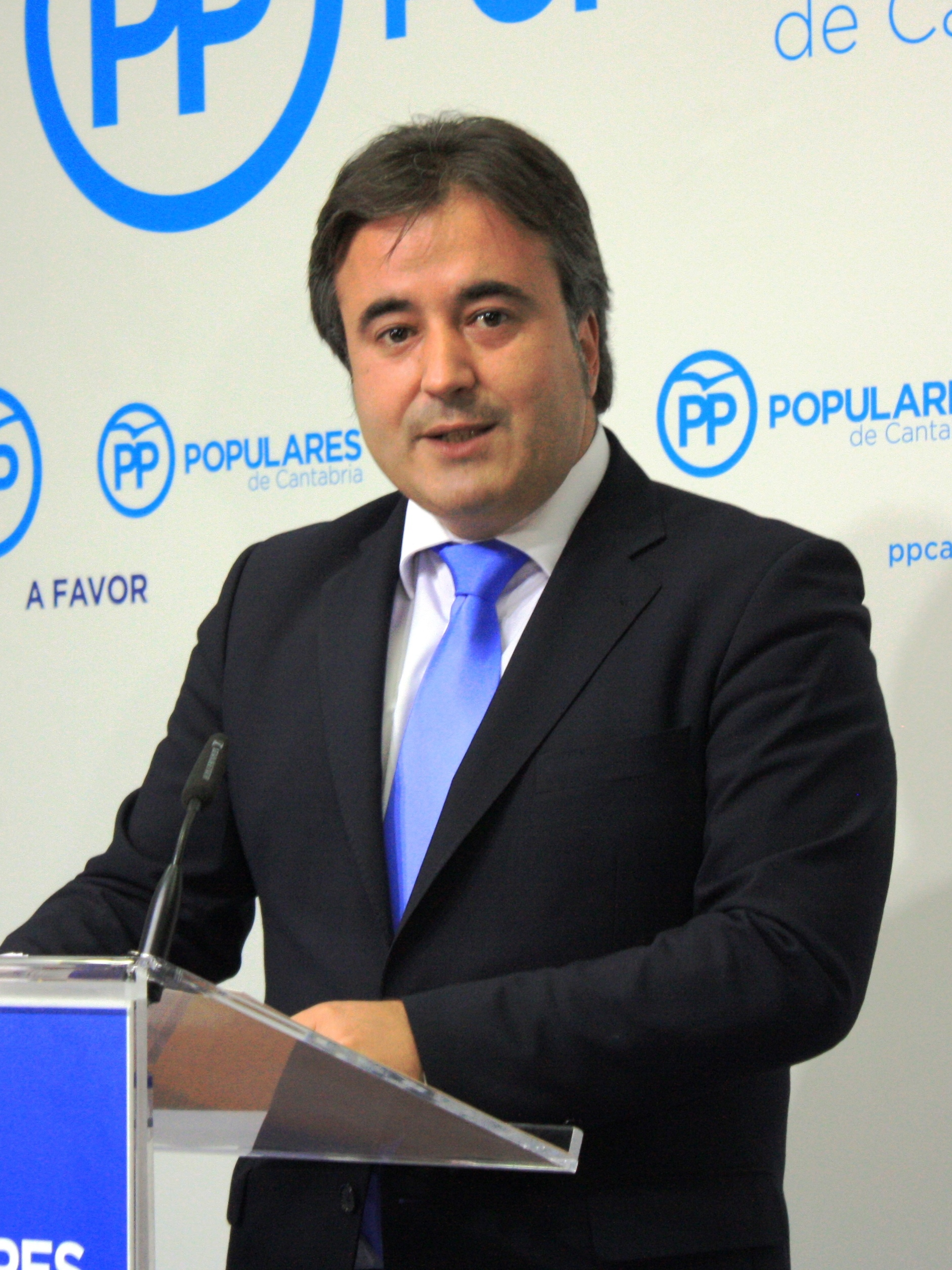 El vicesecretario de Estrategia y Acción Política del PP, Diego Movellán, ofreció una rueda de prensa el 30/01/2018